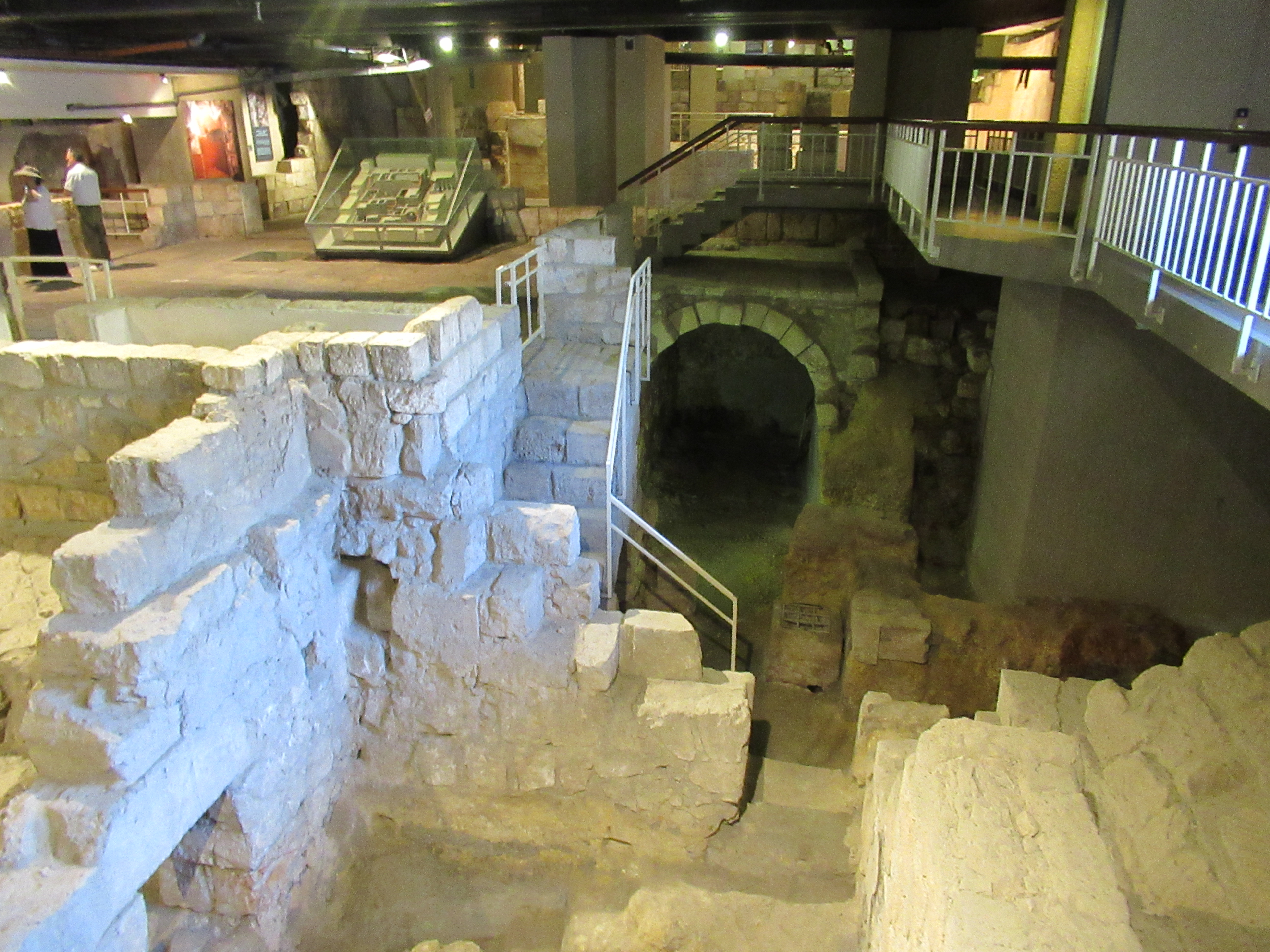 מוזיאון וואהל לארכאולוגיה - הפרוור ההרודיאני הוא מוזיאון ברובע היהודי בעיר העתיקה בירושלים אשר נבנה על שרידיהם של בתי פאר מהעיר העליונה בימי המלך הורדוס ומציג בין היתר מקוואות, פסיפסים, כלי בית וחפצי אמנות בני התקופה. This is a photo of a heritage building in Israel. Its ID is 1-3000-103